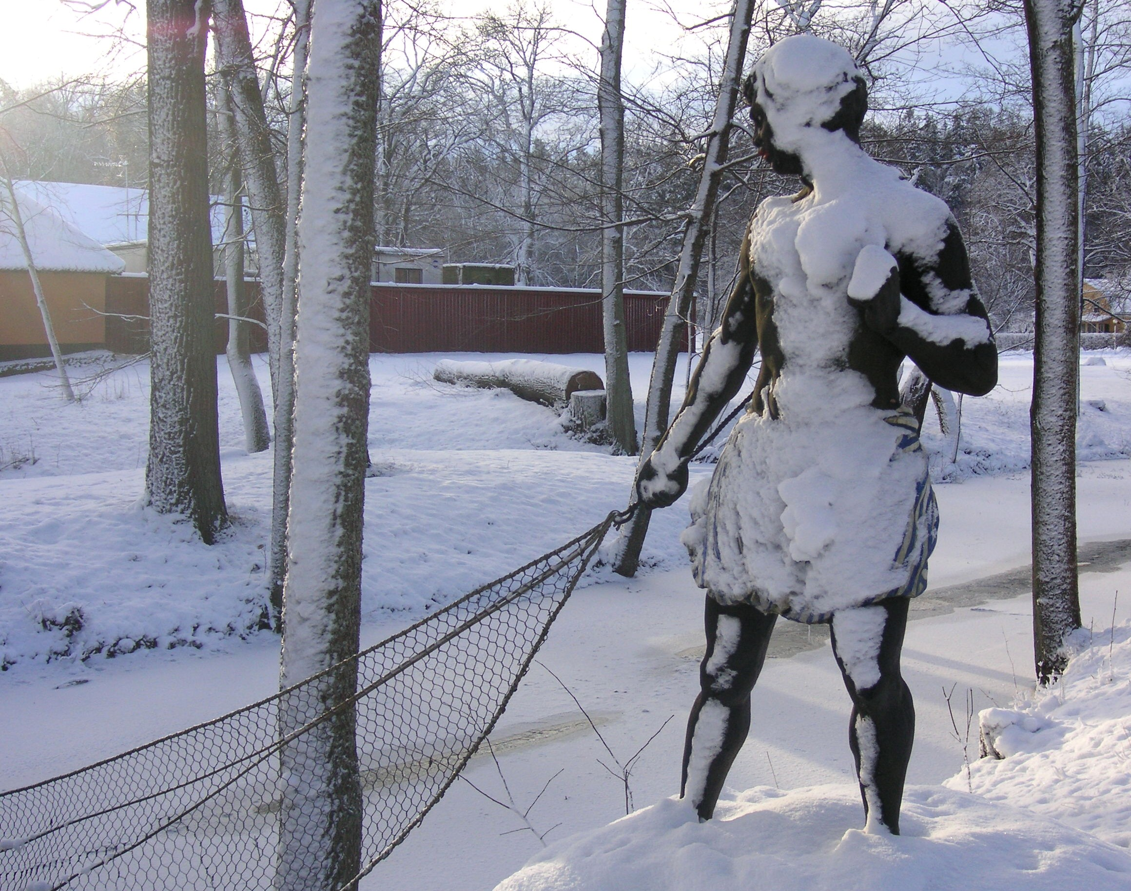 Morianen vid Igelbäcken på Ulriksdals slott